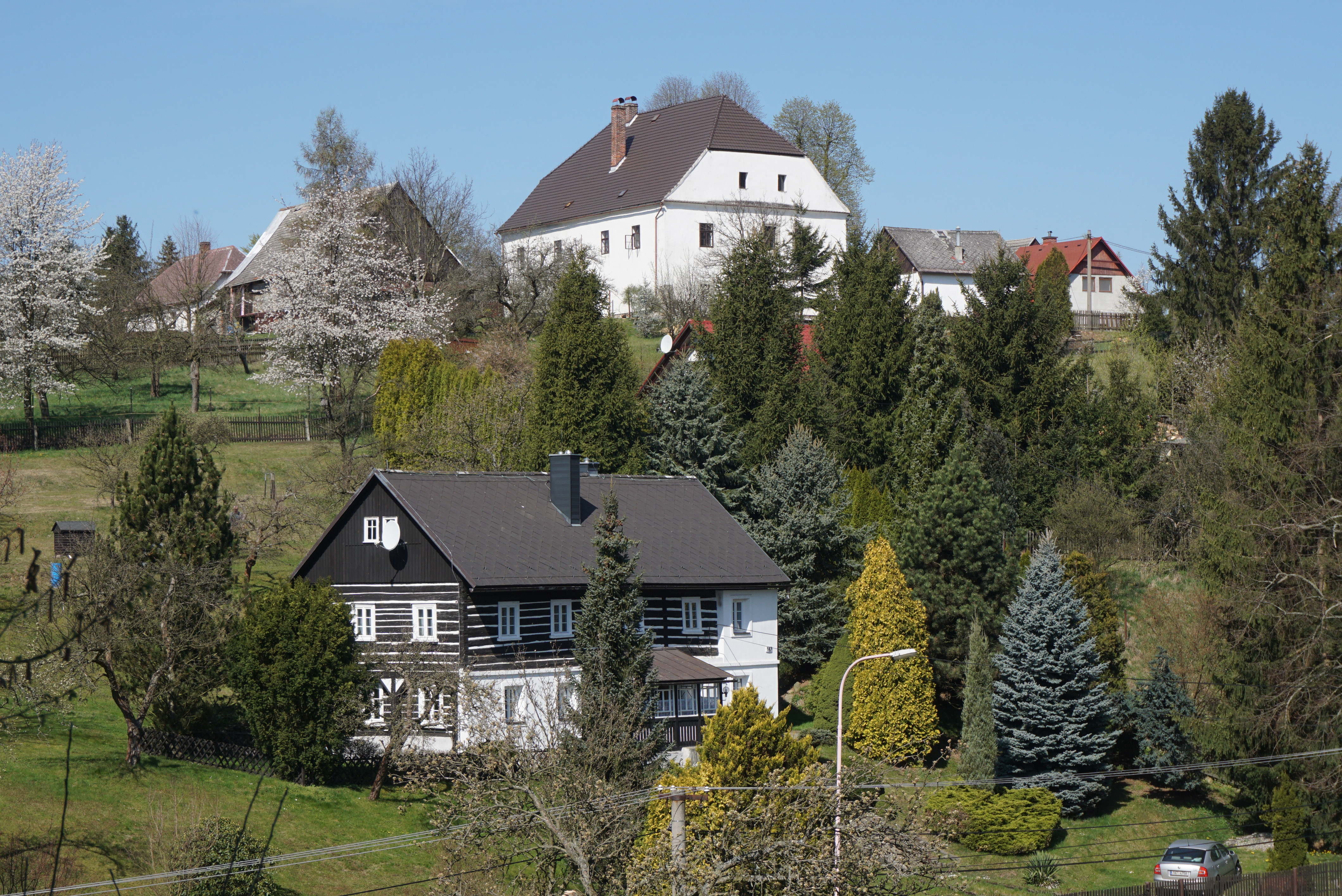 Horní tvrz, Volfartice 195, Volfartice.